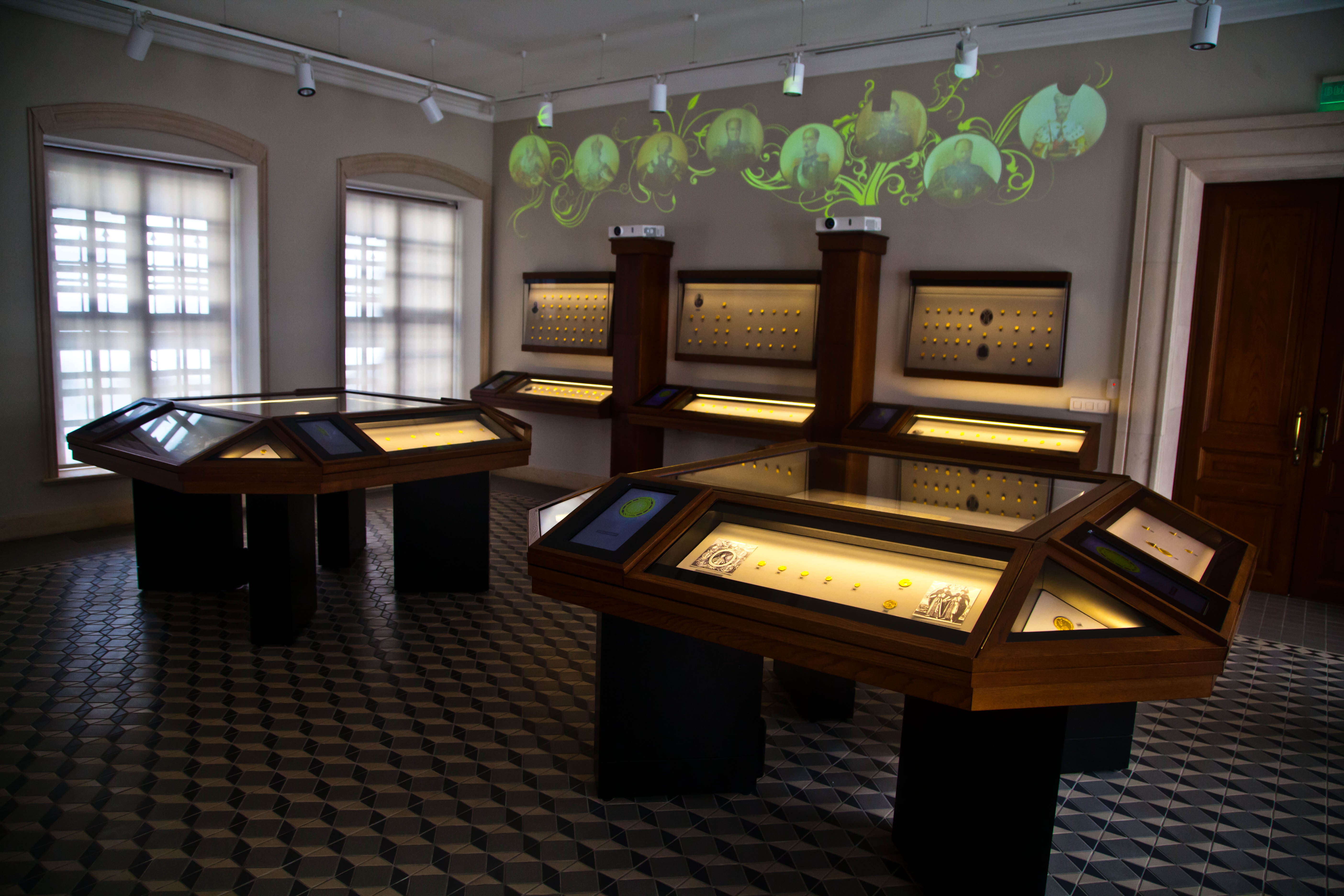 Музей Международного нумизматического клуба, Москва